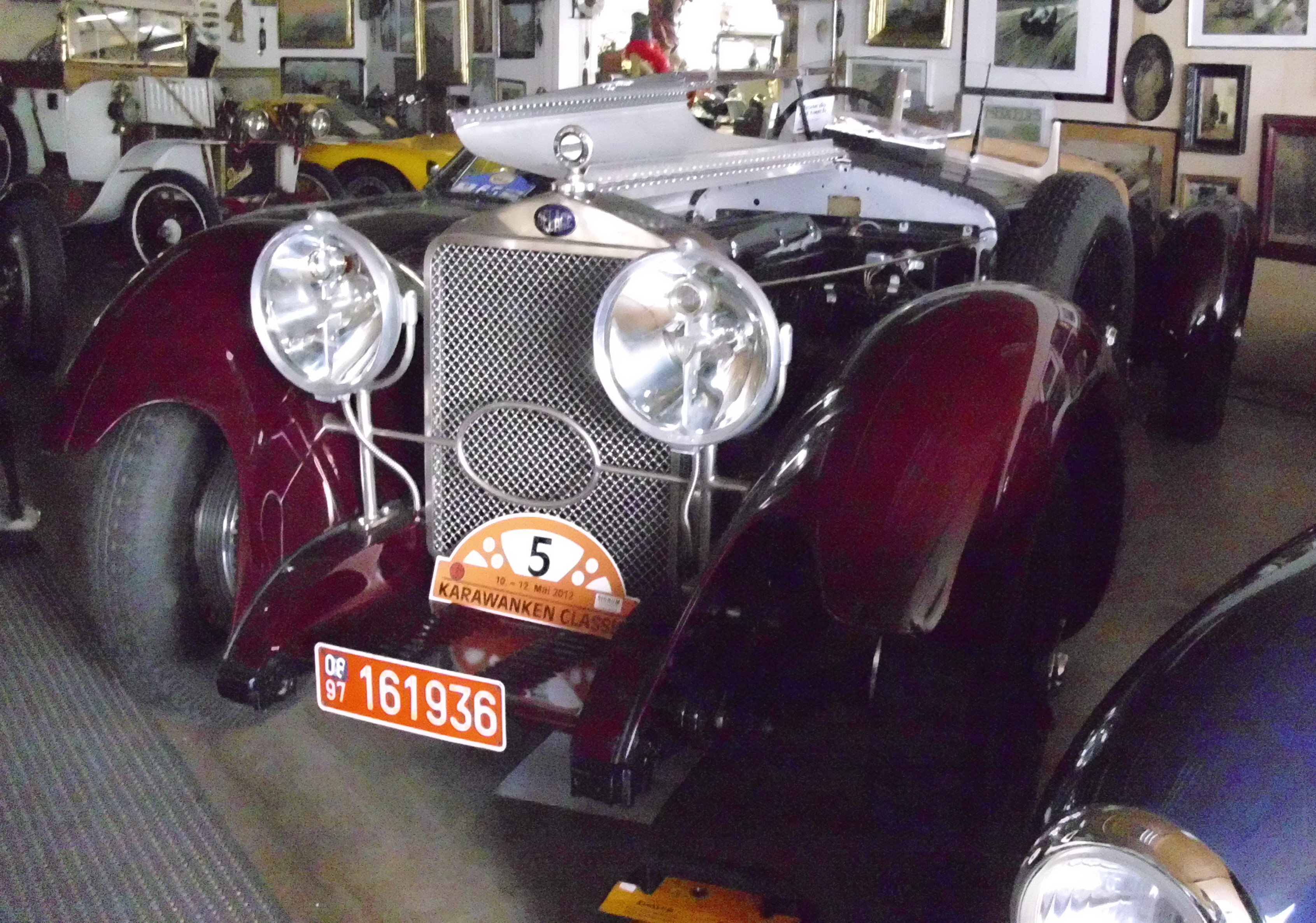 Delage D 6 DM 1929